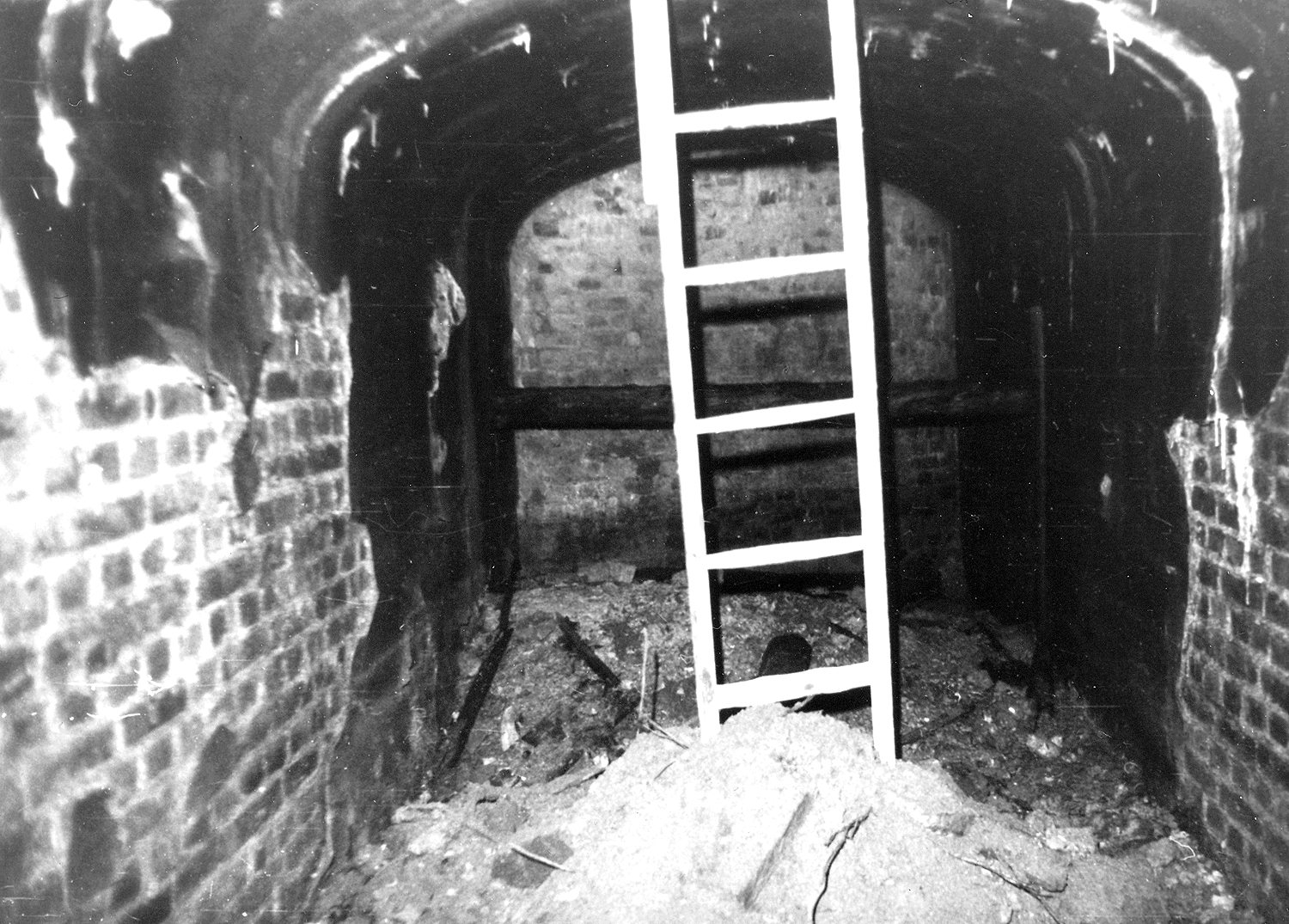 Einstieg in den verschütteten Wetterkanal des Altkalischachtes Conow.